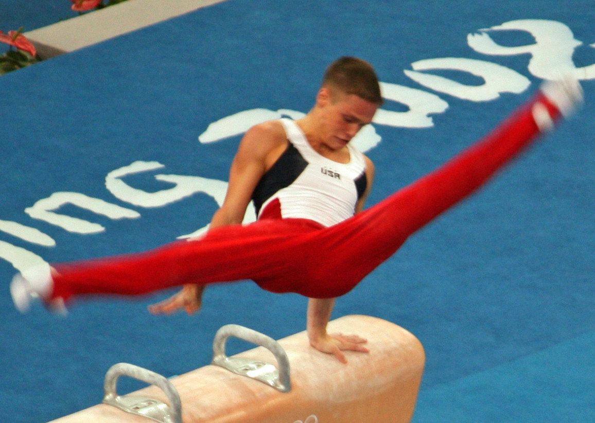 Alexander Artemev on the pommel horse - 2008 OG